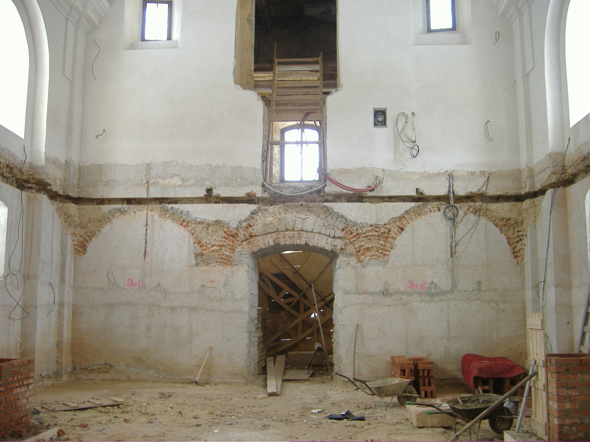 Kostel svatého Martina, Markvartice (okres Děčín).